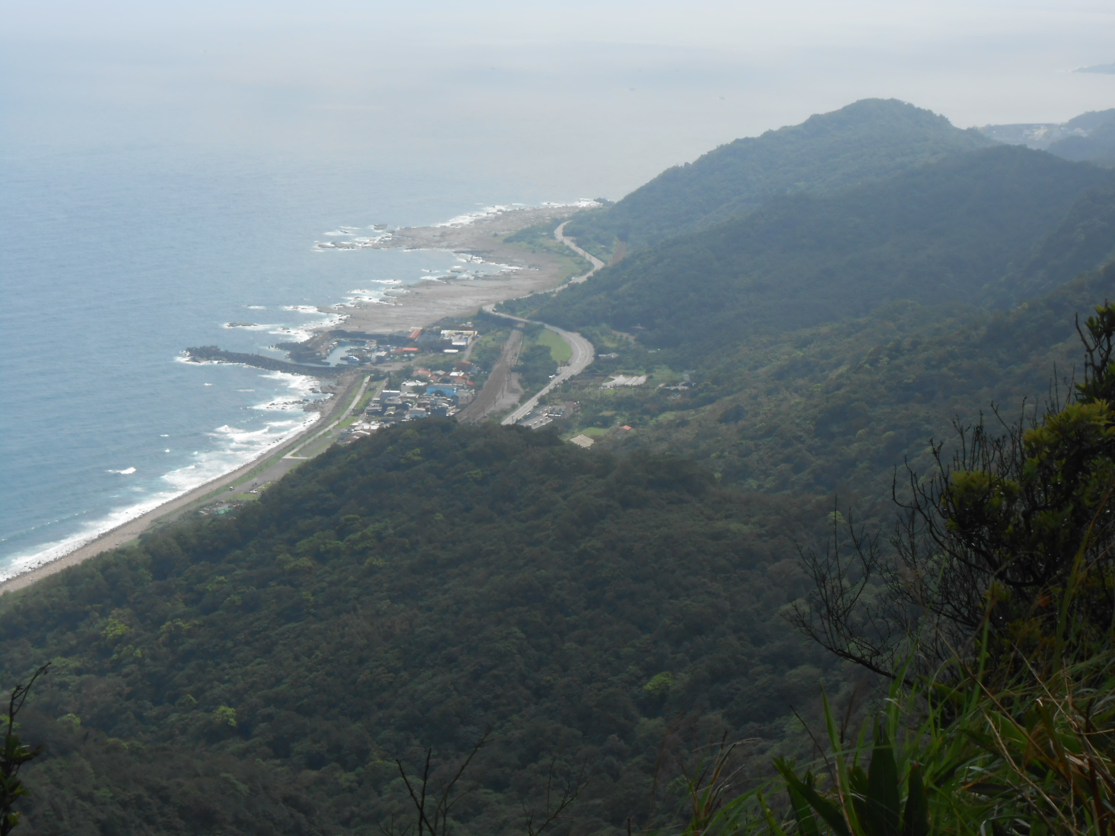 台灣宜蘭縣頭城鎮大里海岸